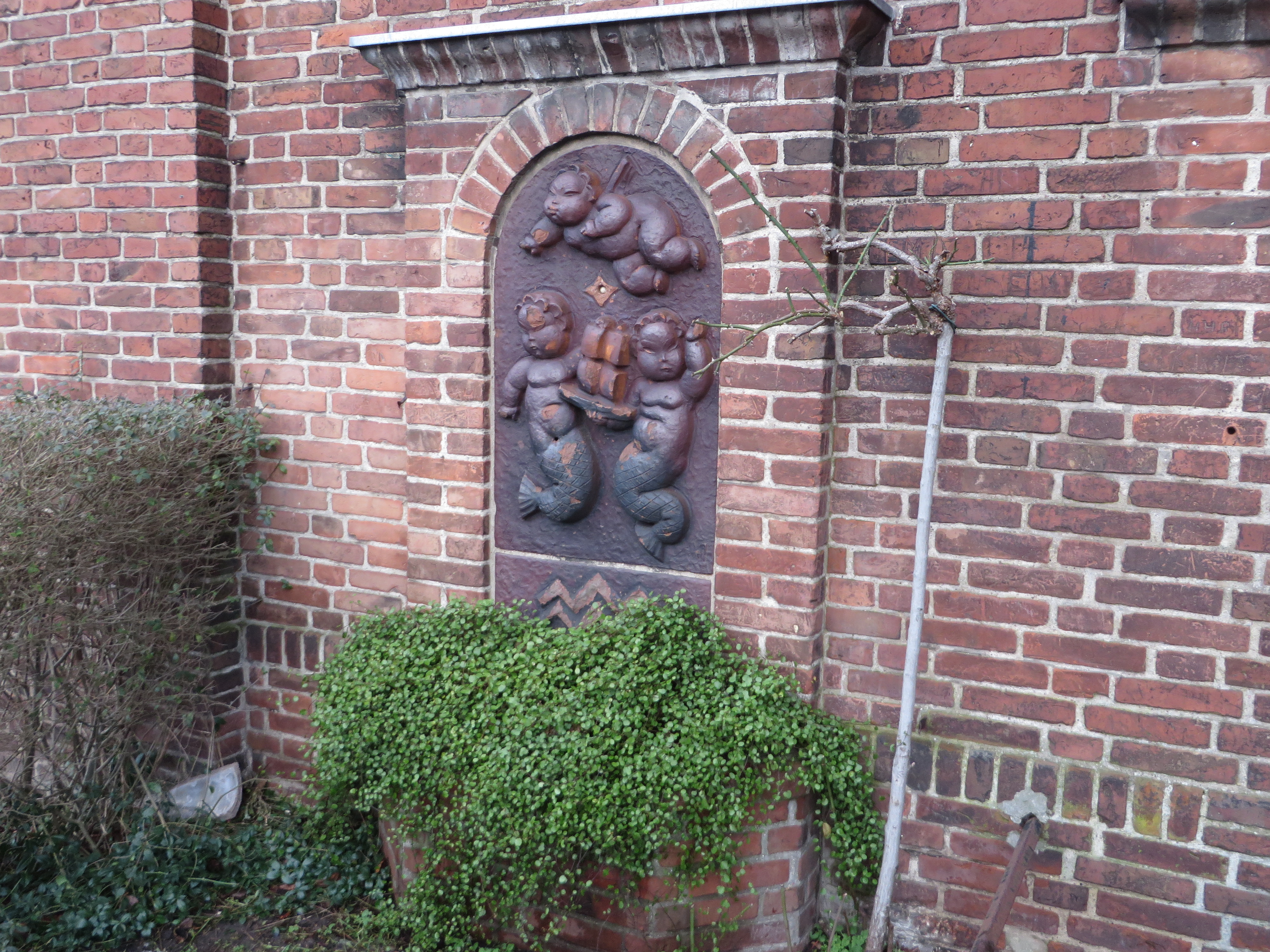 Parkhof Wandbrunnen, Swinemünder Straße 8, Bild 01